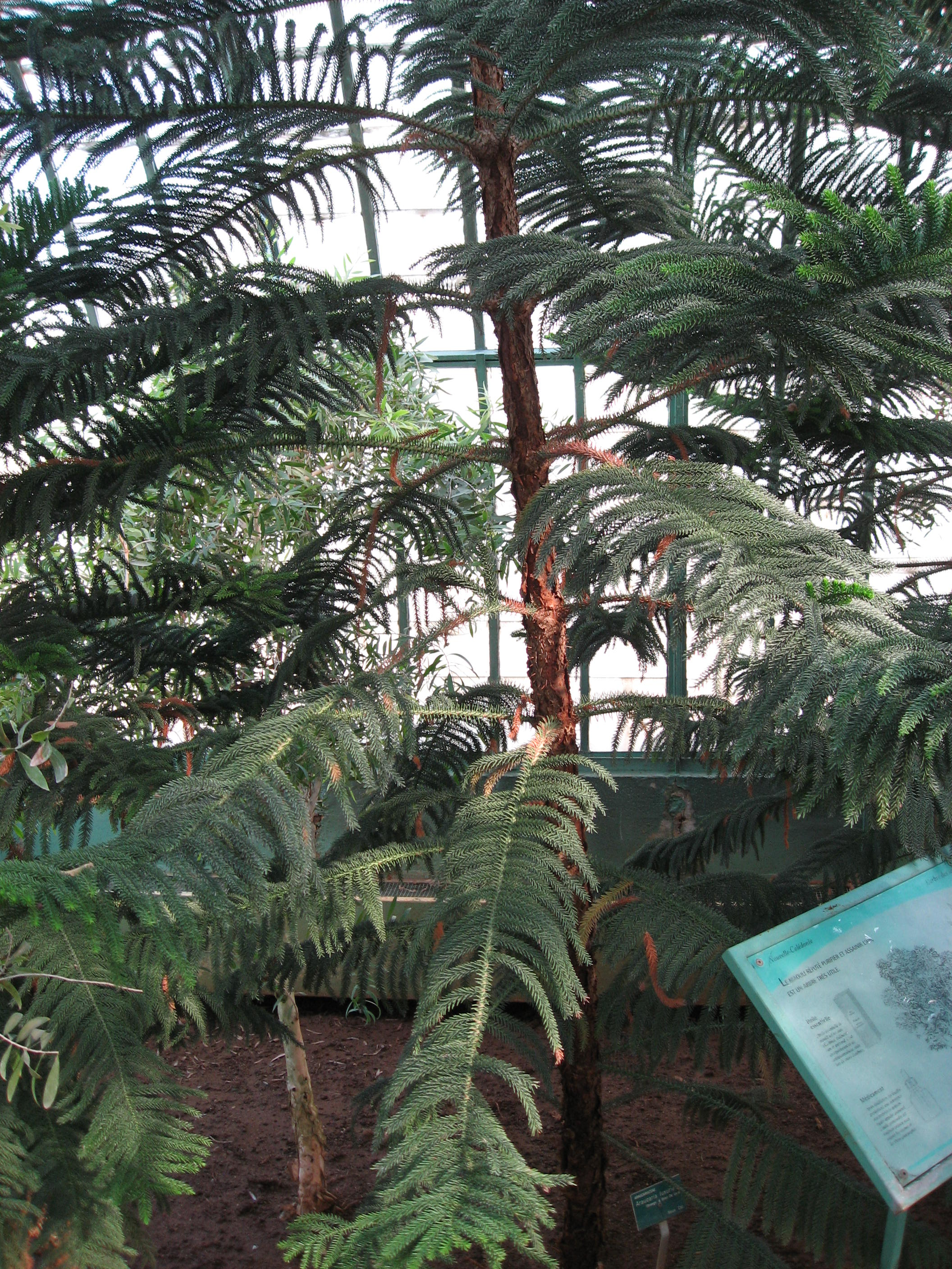 Araucaria luxurians in Serres d'Auteuil Map: 48° 50' 49" N 2° 15' 8" E